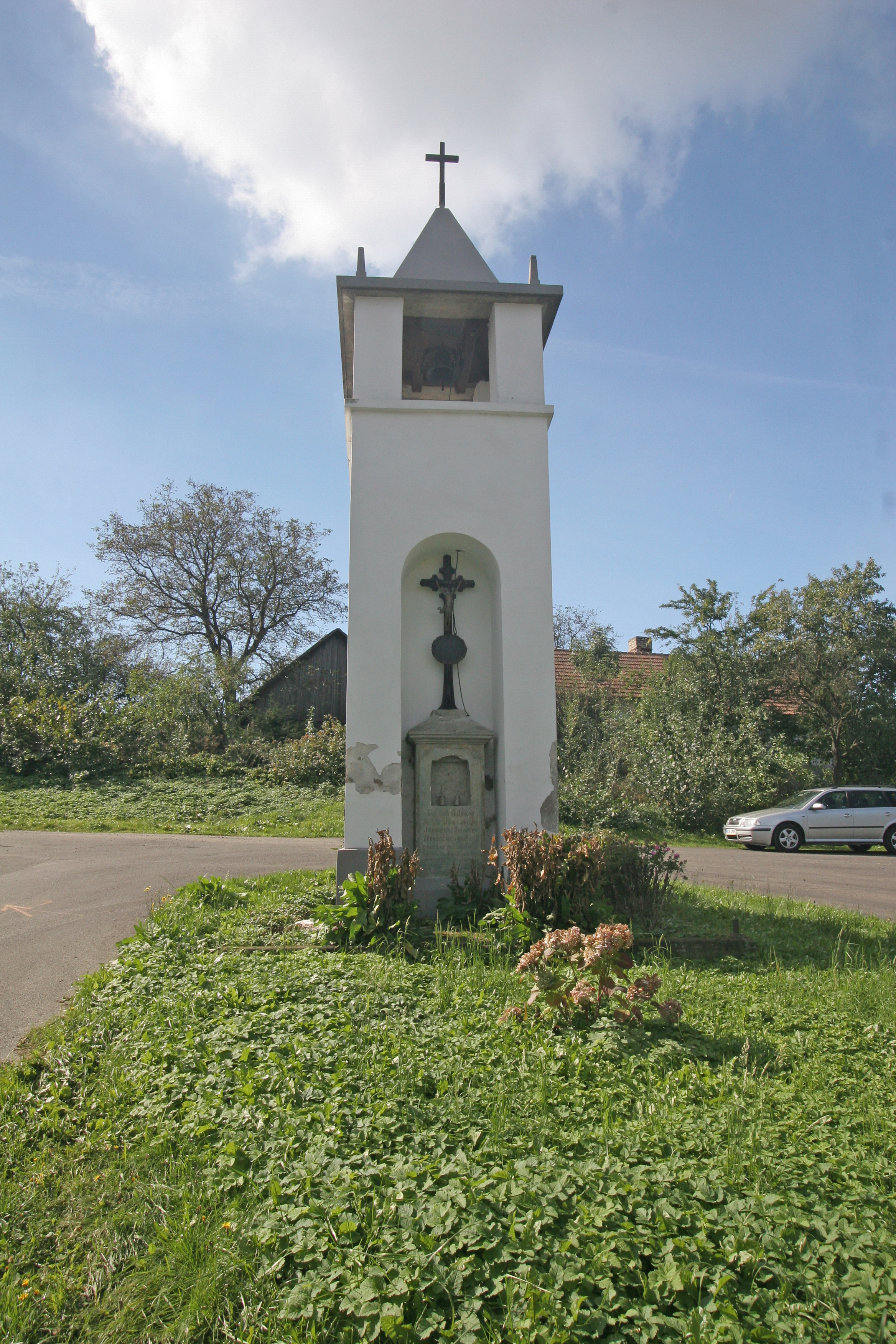 Zbyslavec zvonička